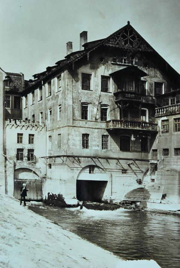 Werkstätten der Firma Brandner am Wöhrd in Regensburg im Jahre 1910